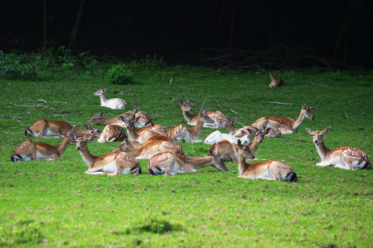 Damwild bei der Sommersmühle, Fünfmühlental, Bad Rappenau